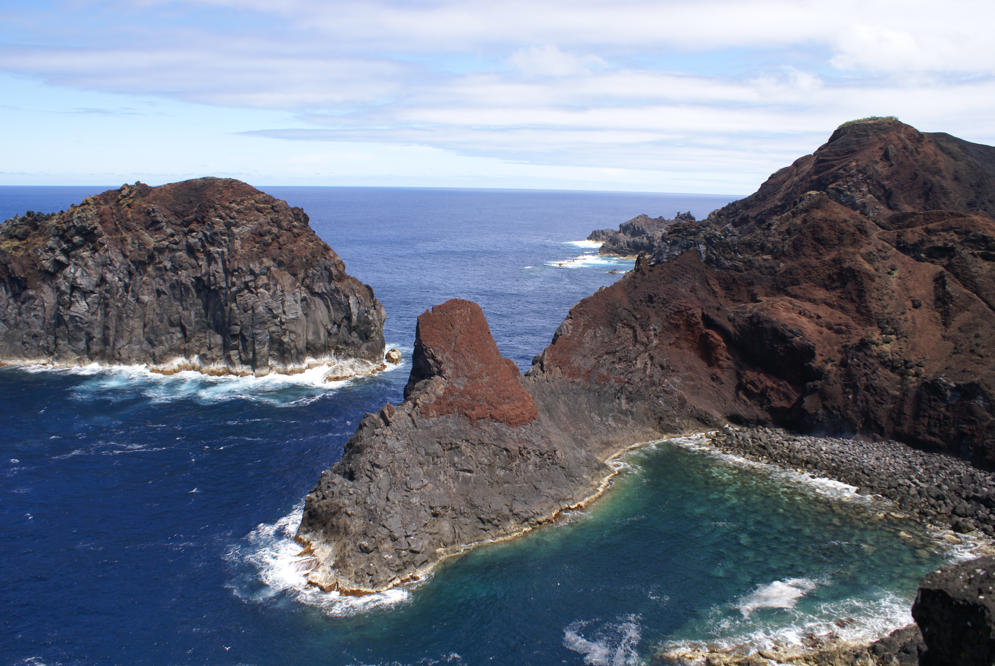 Baía da Ponta da Barca e ilhéu da Baleia, aspecto da costa, ilha Graciosa, Açores, Portugal